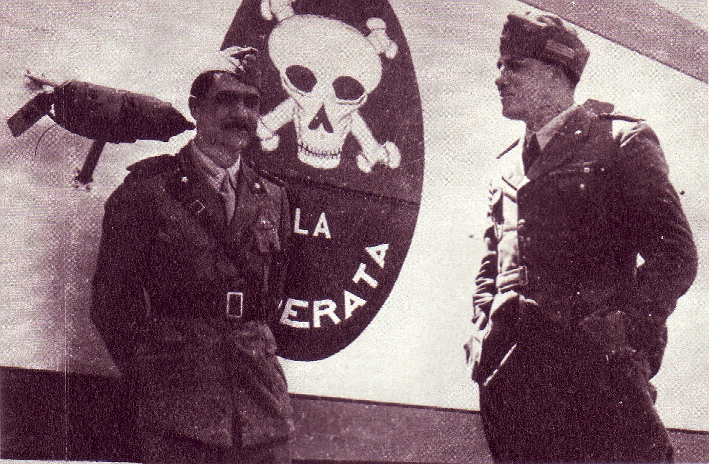 Pavolini accanto alla carlinga di un velivolo della squadriglia "La Disperata" in AOI 1935